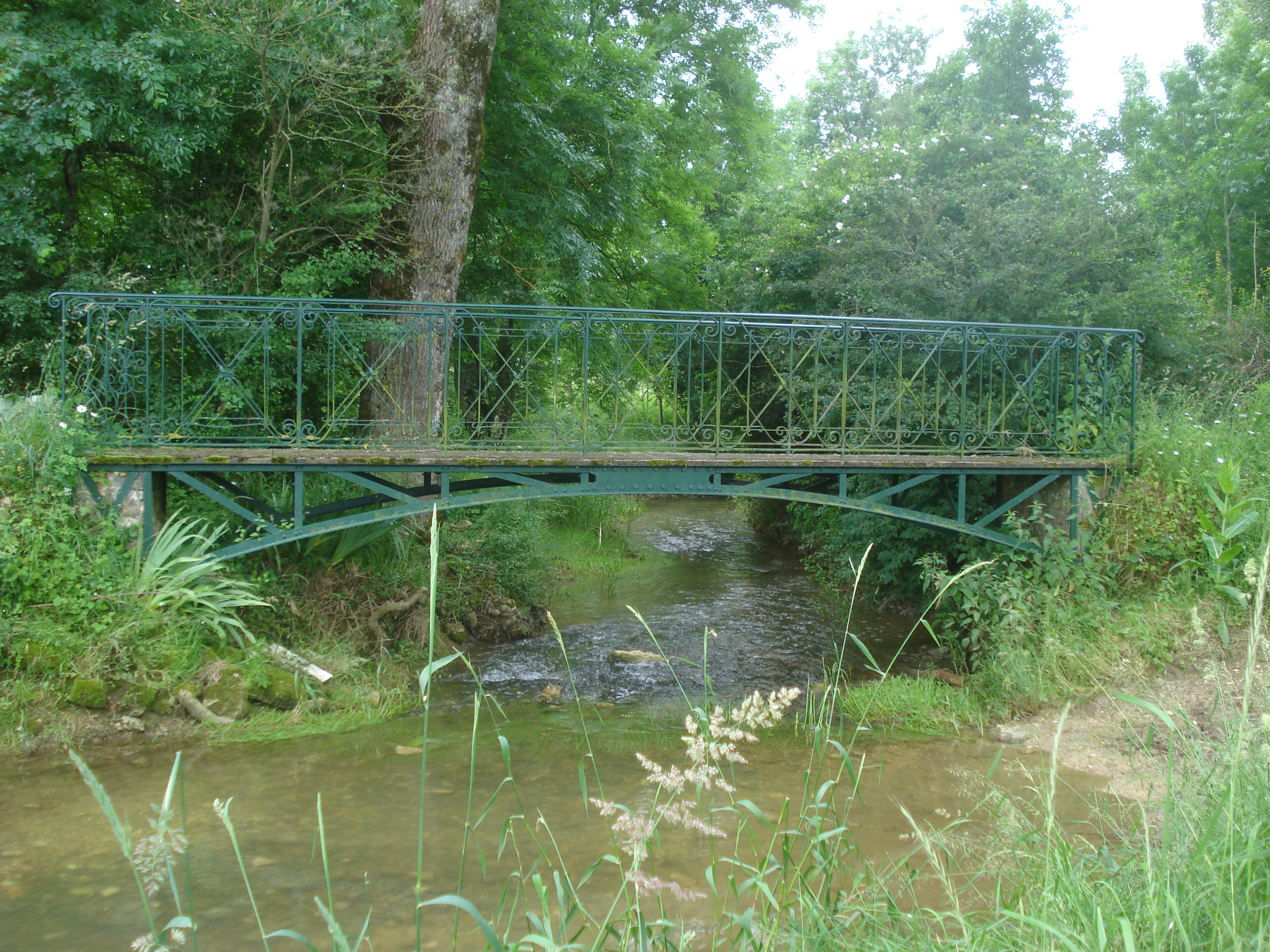 Image:Passerelle sur Le Colin à Sainte-Solange (Cher, Fr).JPG